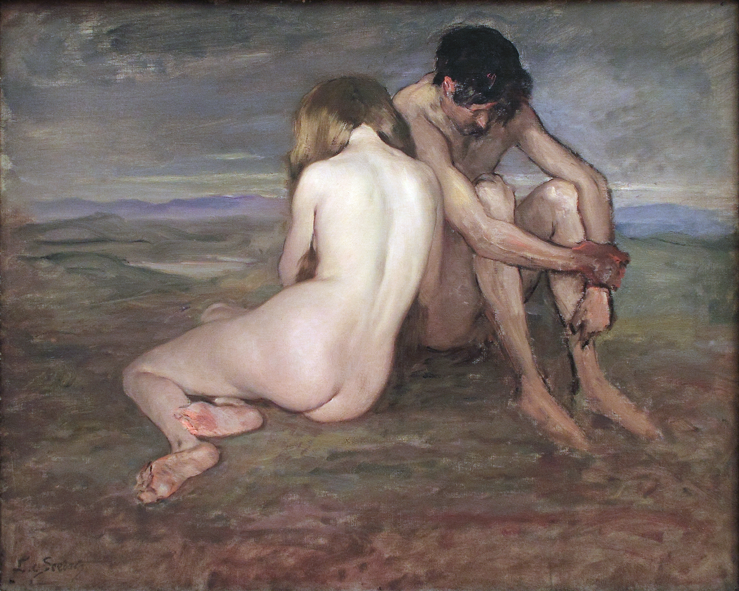 Adam and Eva